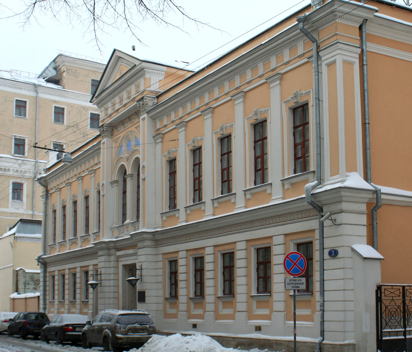 Московская центральная церковь евангельских христиан-баптистов — одна из старейших и самых крупных баптистских церквей в России, расположенная в Белом городе (Кулишки) — историческом районе Москвы в здании № 3 в Малом Трёхсвятительском переулке. Объект культурного наследия регионального значения.[1] Здание церкви было перестроено в 1865 году архитектором Германом фон Ниссеном [2] из жилого дома XVIII века и предназначалось для реформатской церкви. В 1917 году здание было передано общине евангельских христиан.